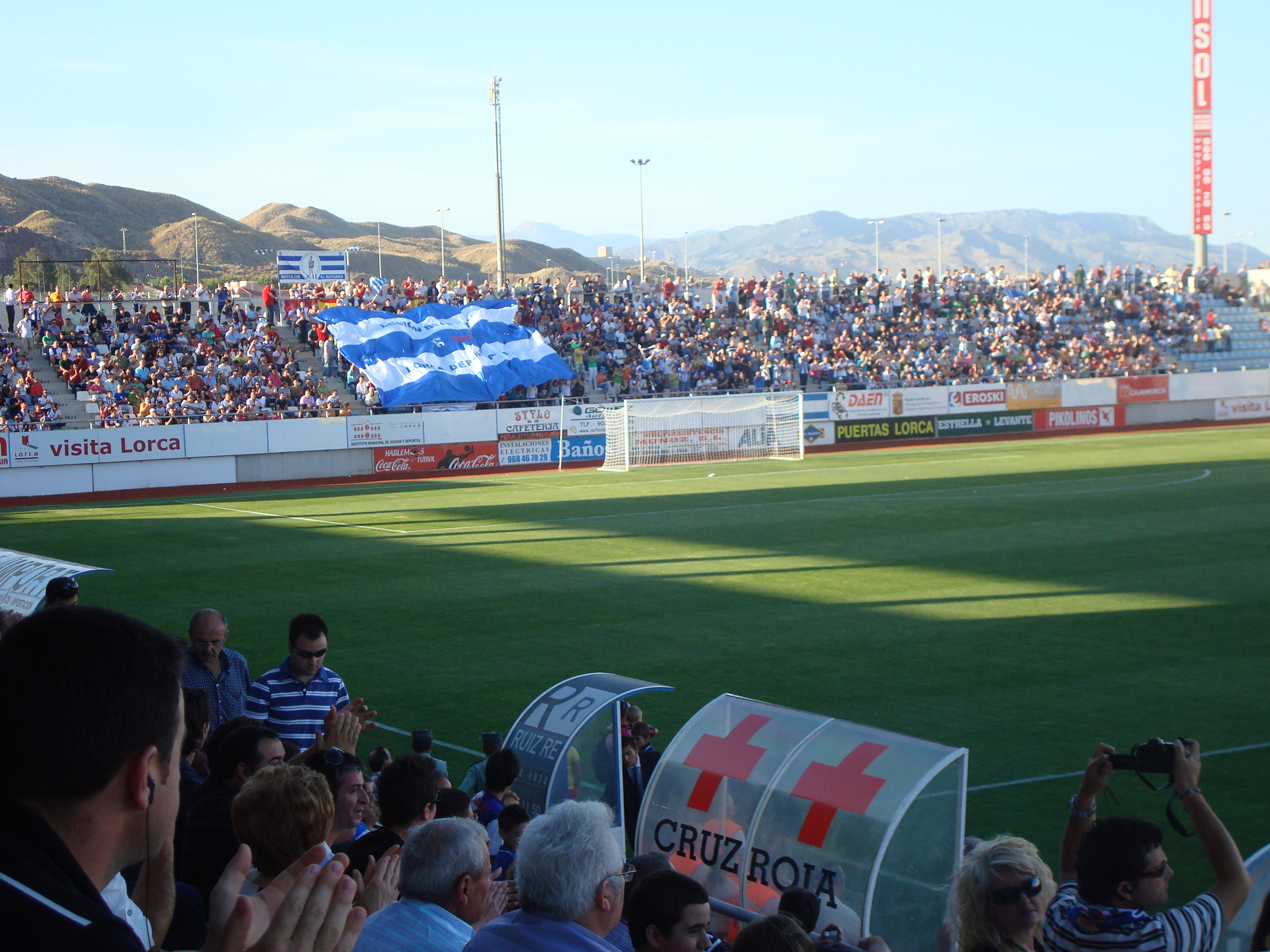 Grada en el Lorca Villarreal B